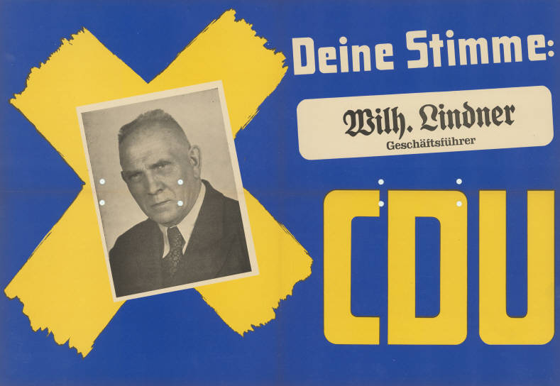 Deine Stimme: Wilh. Lindner Geschäftsführer CDU Abbildung: Porträtfoto - Stimmkreuz Plakatart: Kandidaten-/Personenplakat mit Porträt Objekt-Signatur: 10-009 : 167 Bestand: Landtagswahlplakate Nordrhein-Westfalen (10-009) GliederungBestand10-18: Landtagswahlplakate Nordrhein-Westfalen (10-009) » Landtagswahl am 18.6.1950 » CDU » mit Porträtfoto Lizenz: KAS/ACDP 10-009 : 167 CC-BY-SA 3.0 DE